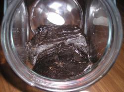 propolis